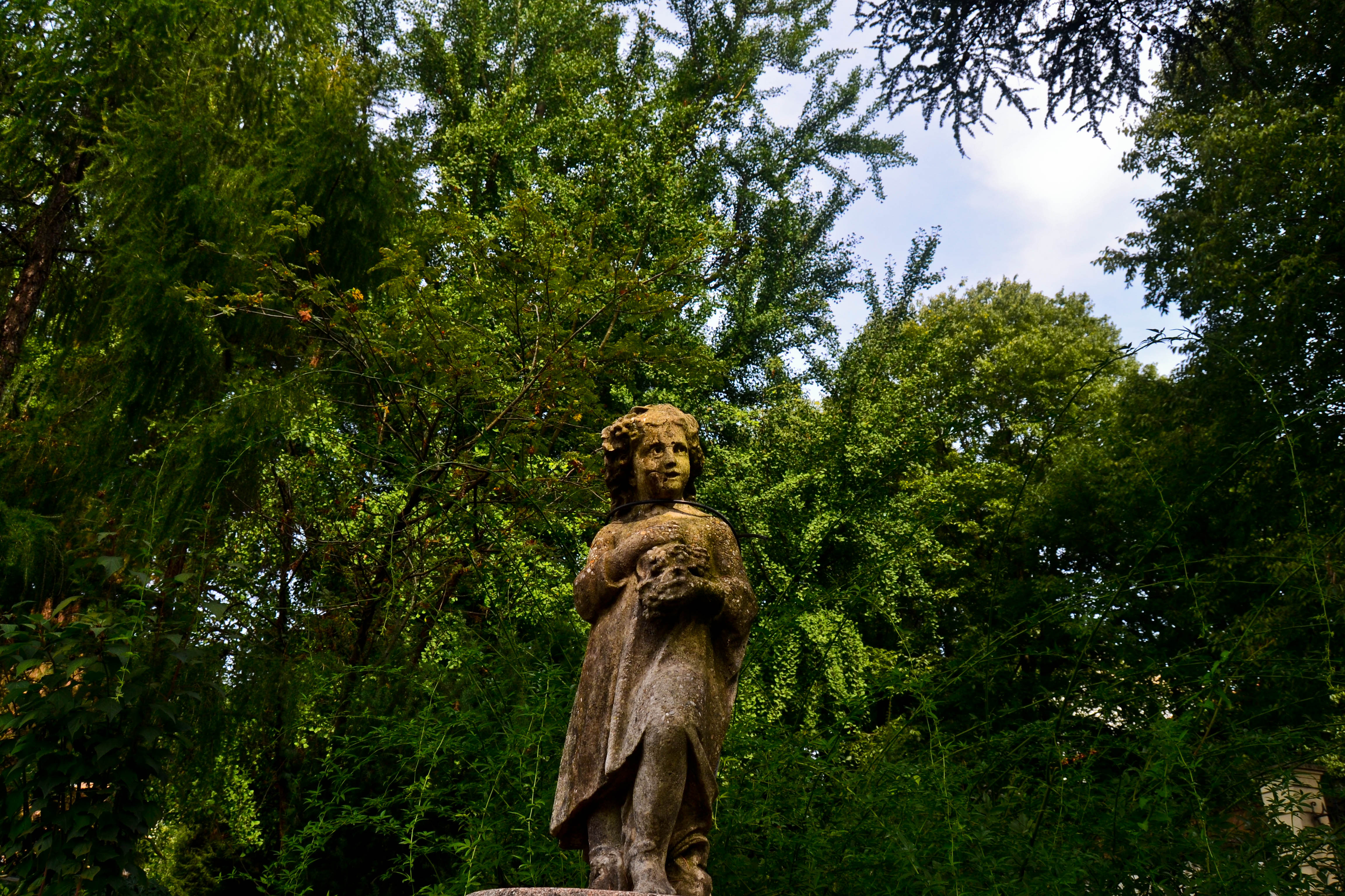 Orto Botanico dell'Università di Pavia This is a photo of a monument which is part of cultural heritage of Italy.